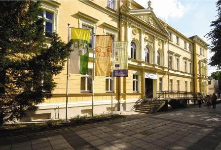 Zielona Góra, Aleja Niepodległości 15 - budynek Muzeum Ziemi Lubuskiej (zabytek nr 5340/310/76)